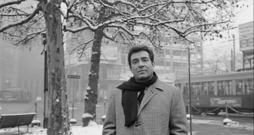 Screenshot del film La vita agra (1964) di Carlo Lizzani.